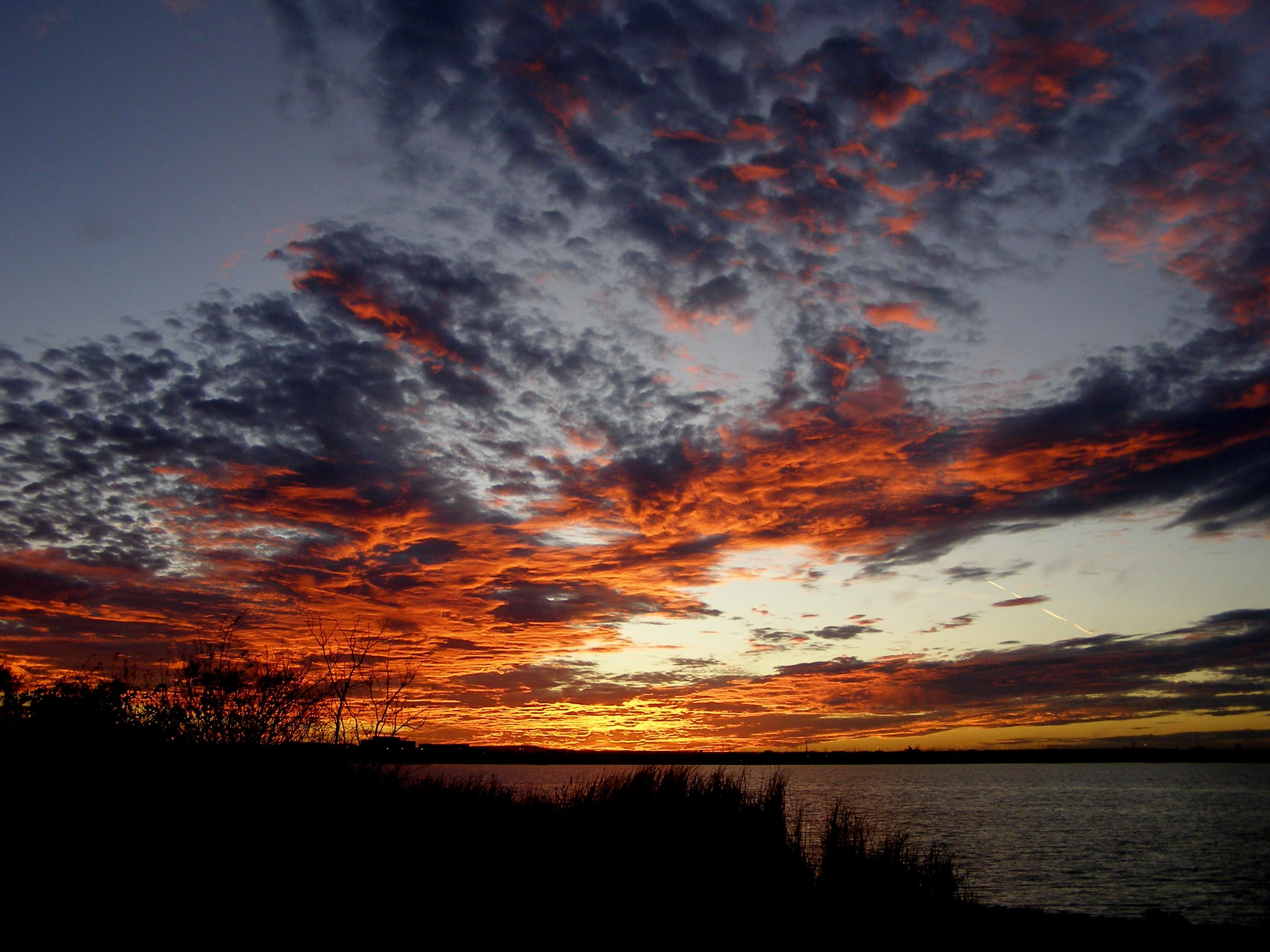 Taken on December 19, 2008.